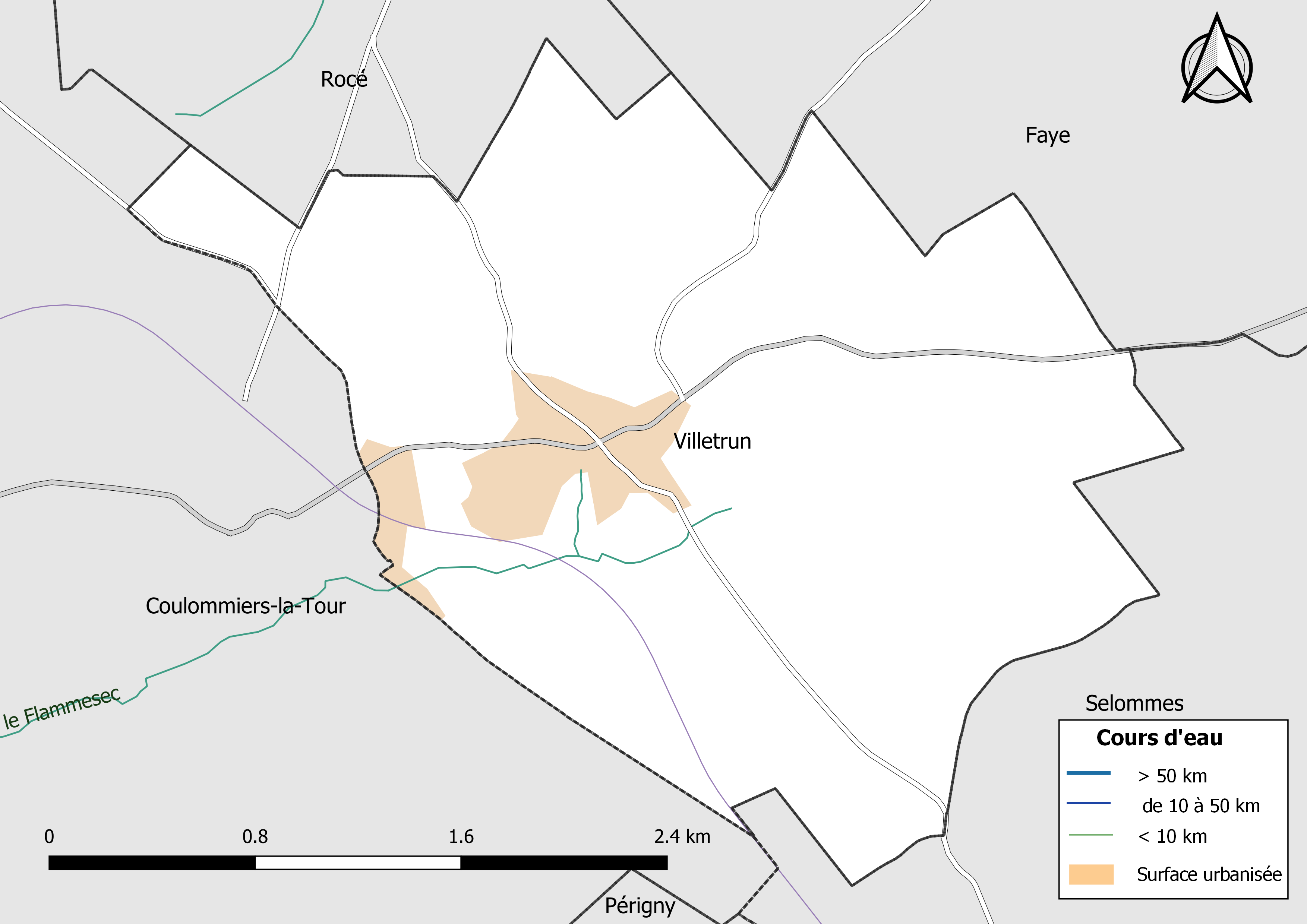 Carte du réseau hydrographique de la commune de Villetrun (Loir-et-Cher, France).